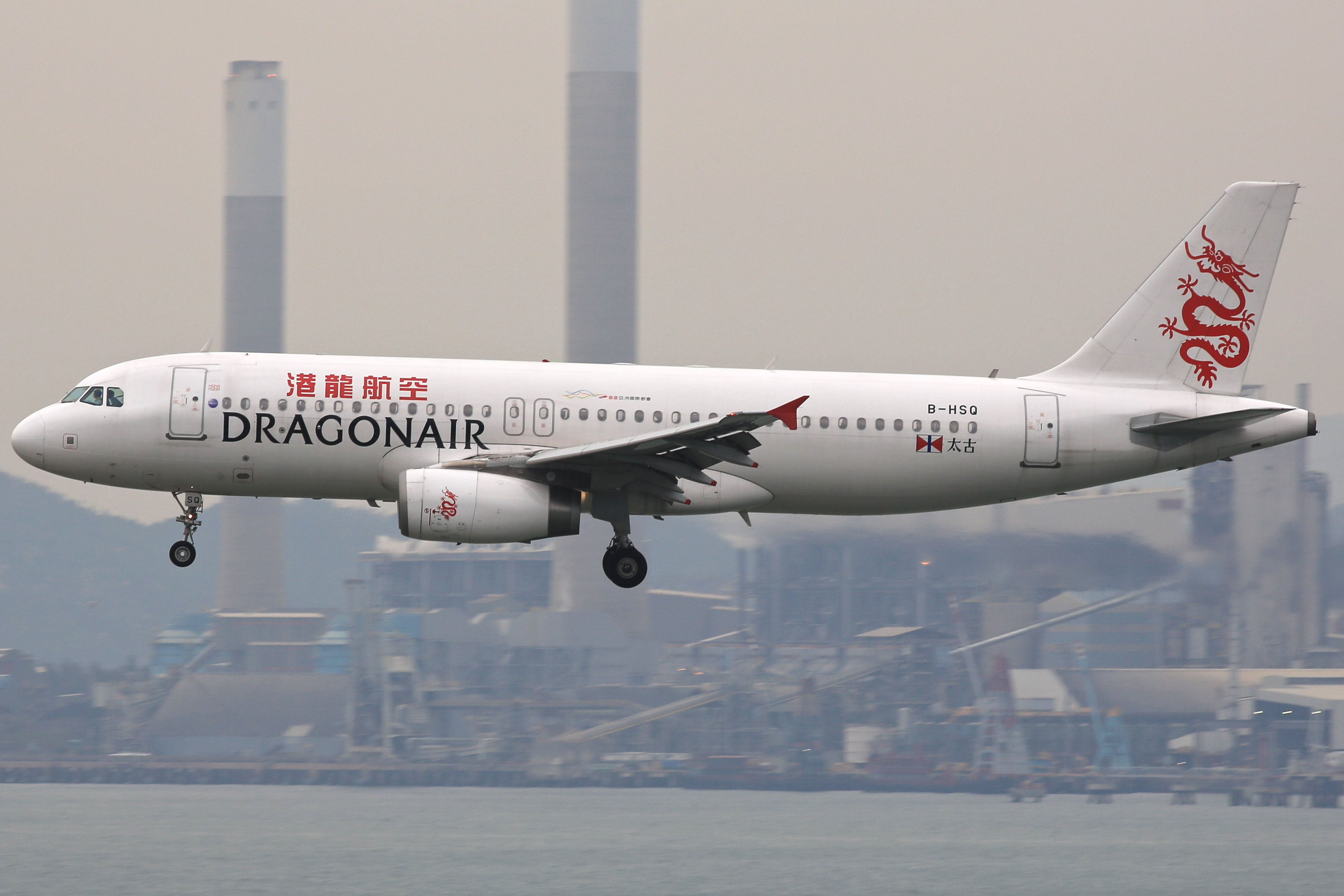 B-HSQ | C/N 5024 | A320-232 | Dragonair | Hong Kong